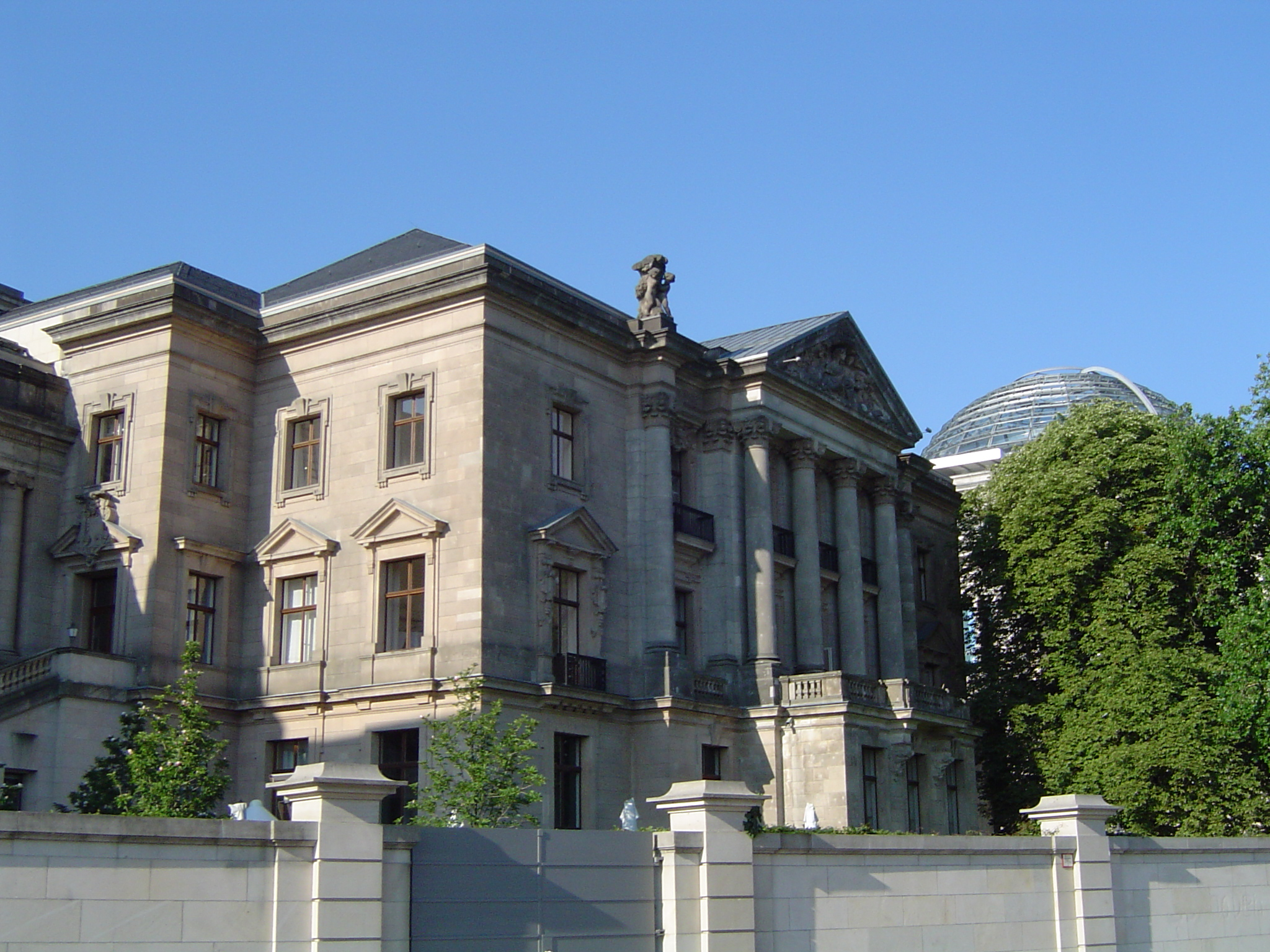 German Parlamentarian Society in Berlin-Mitte in the building Reichstagspräsidentenpalais